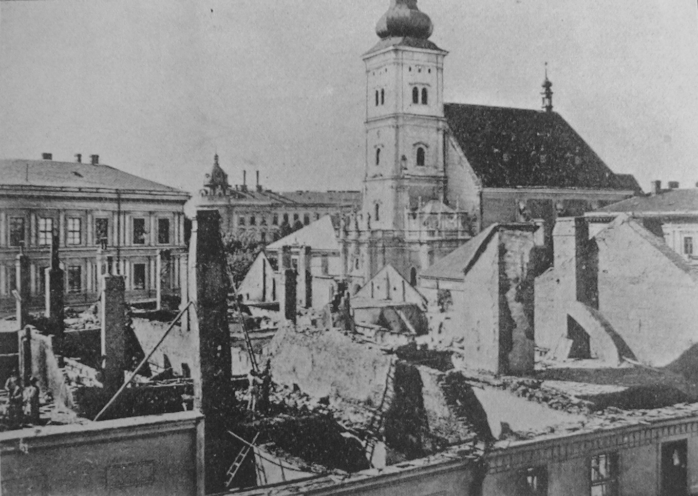 Pohled_na_Vyškov_těsně_po_požáru_roku_1917 (Vyškov- czech republic)